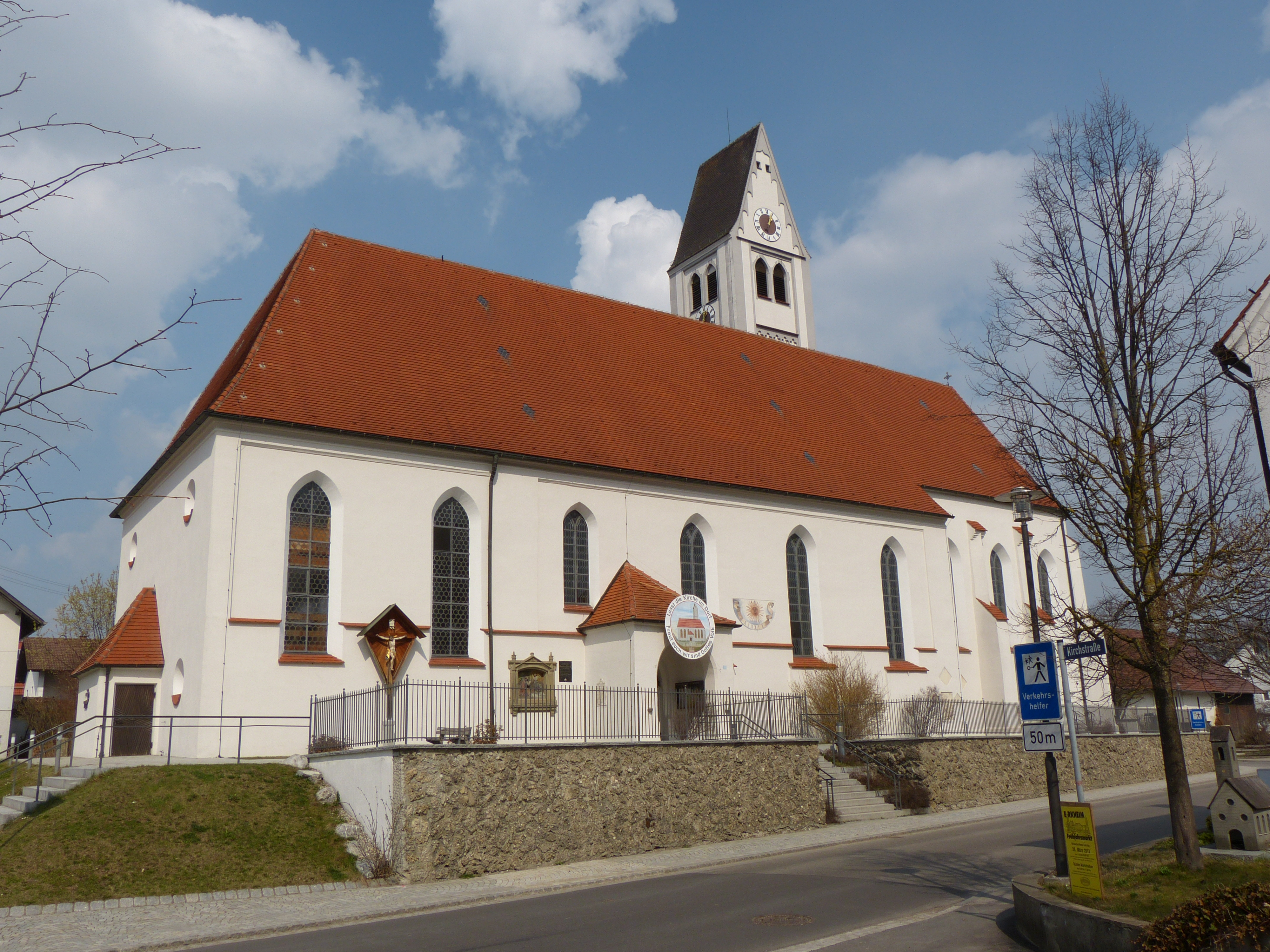 St. Jacobus maior, Markt Rettenbach, Landkreis Unterallgäu, Bayern